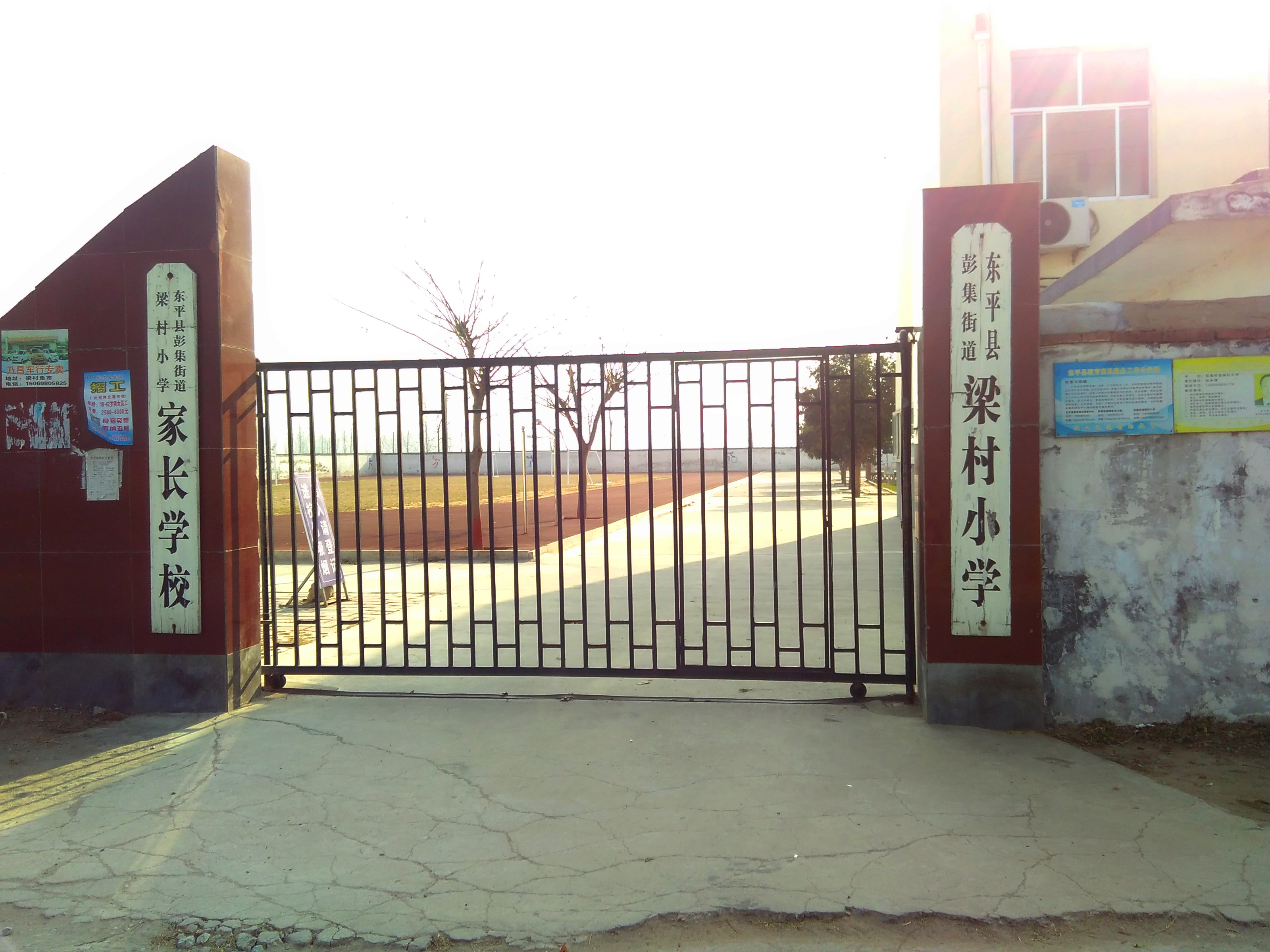 東平縣彭集街道东梁村小学